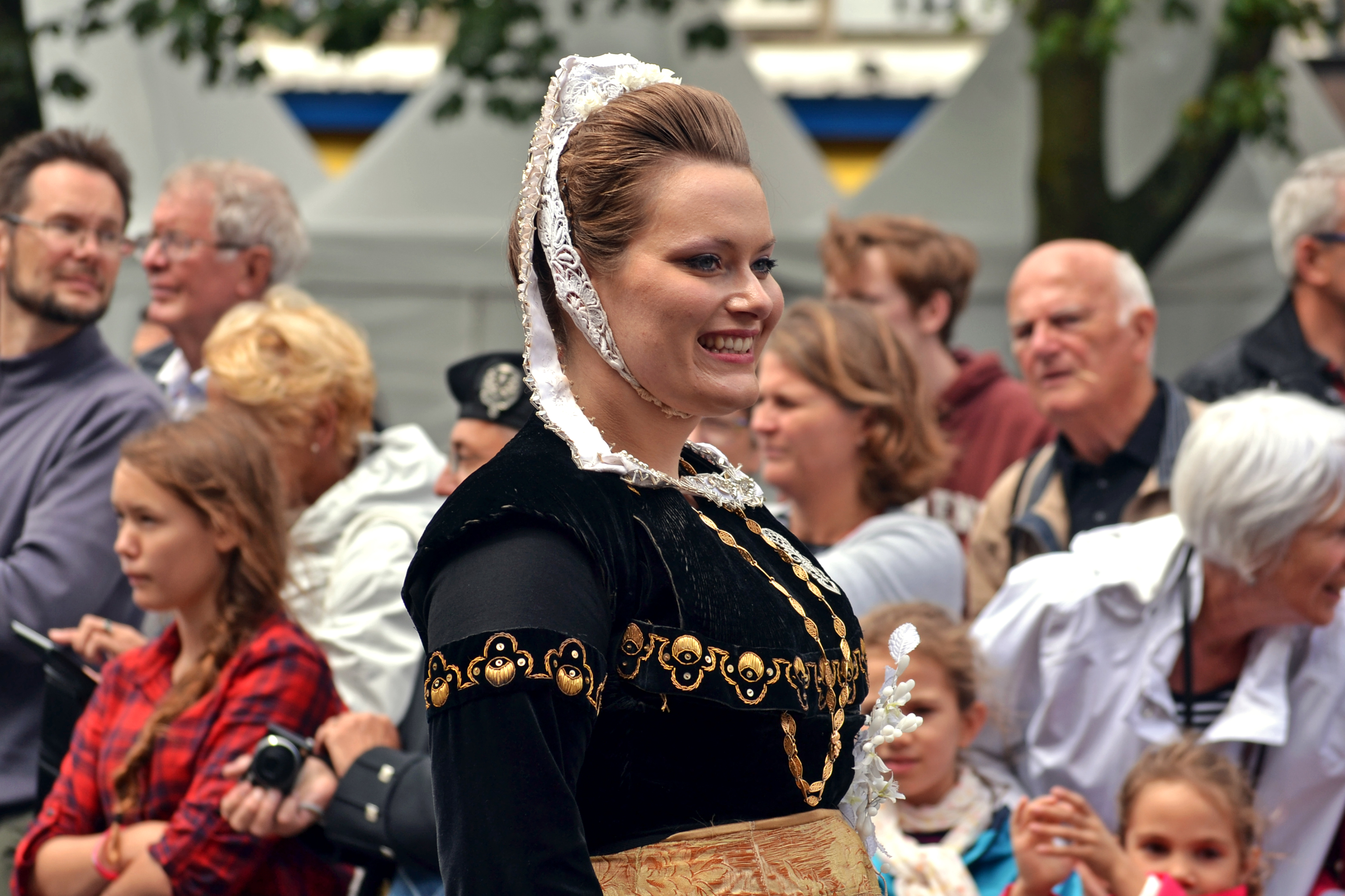 Les élues de l'élection 2014 de la Reine de Cornouaille lors du festival de Cornouaille 2015 le dimanche 26 juillet pour Kemper en Fête dans les rues de Quimper.